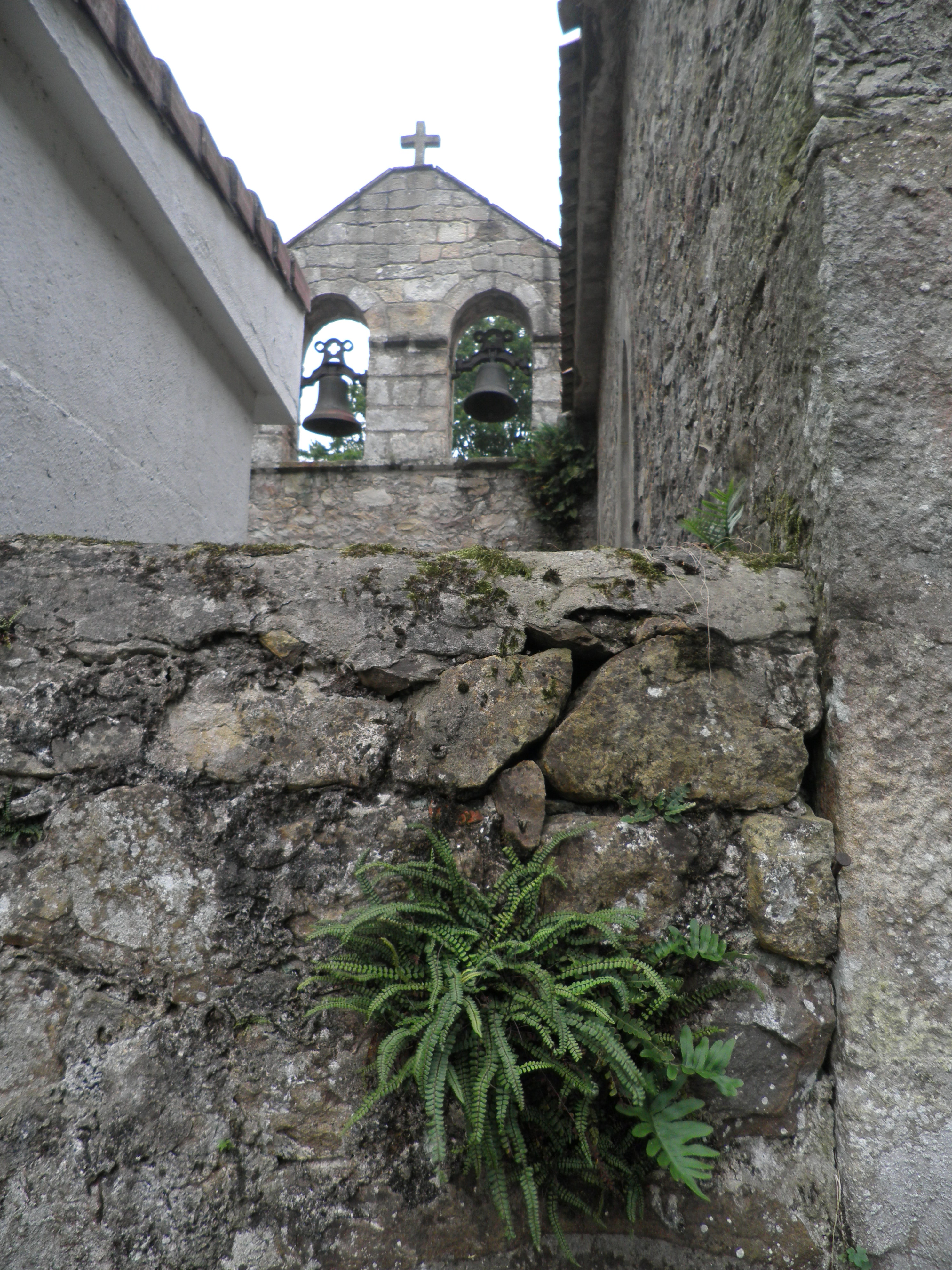 Campanar de l'església parroquial de l'Assumpció a Acereda (Santiurde de Toranzo, Cantàbria). Romànic de transició.